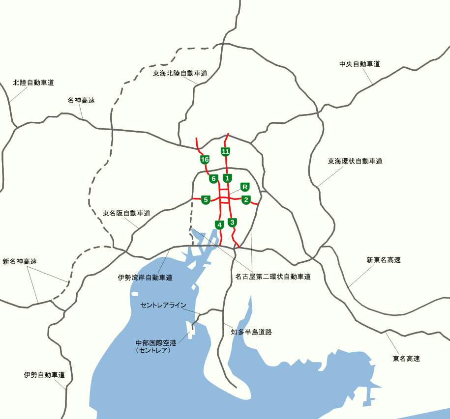 Nagoya Expressway Map